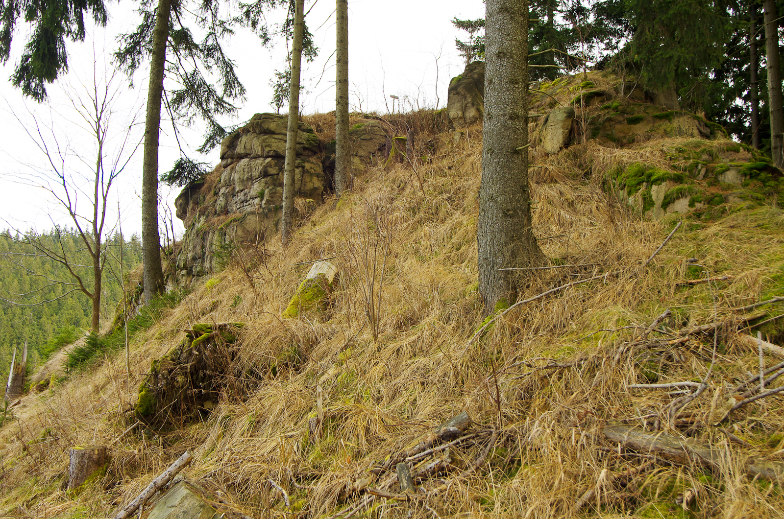 zaniklý hrad Plikenštejn nad Lobezským potokem, okres Sokolov